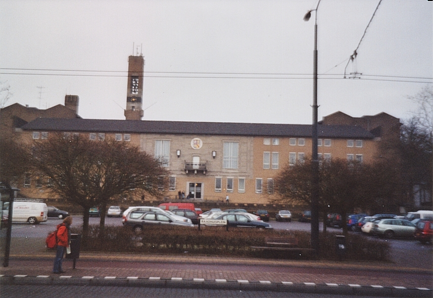 Raadhuis Oosterbeek (2005)